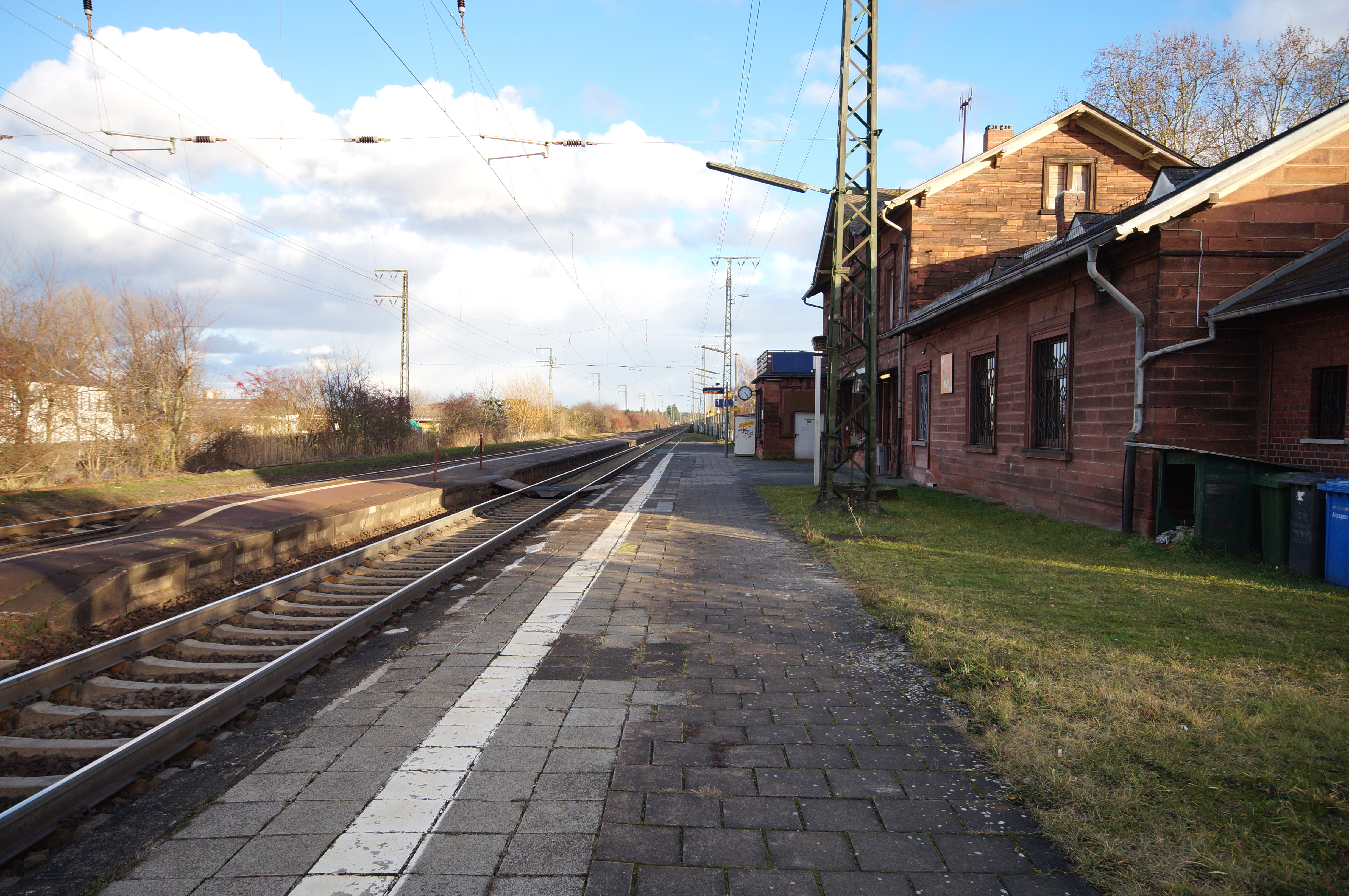 Die Bahnsteige des Bahnhofs Weiterstadt an der Rhein-Main-Bahn